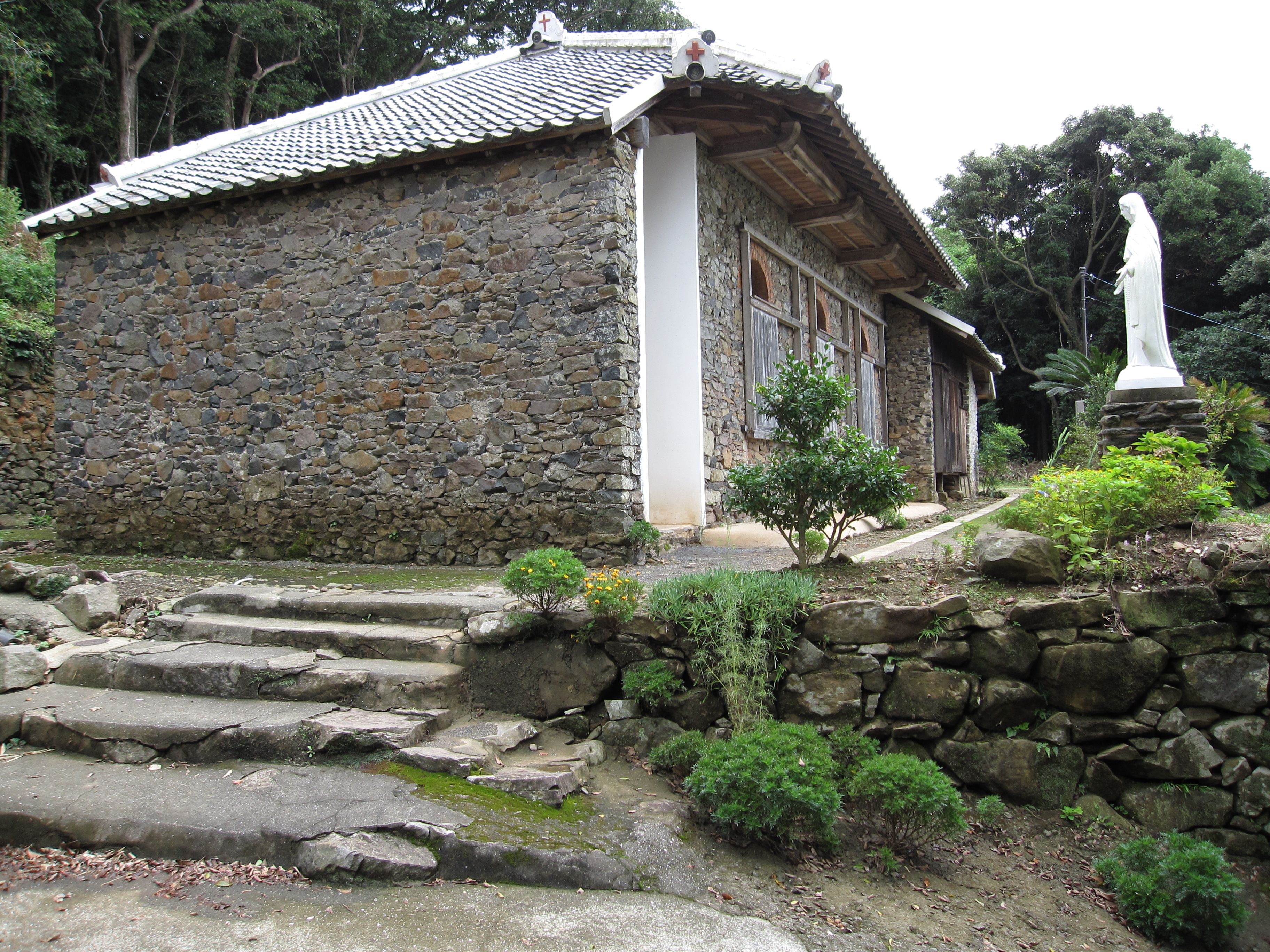 長崎県長崎市にある大野教会